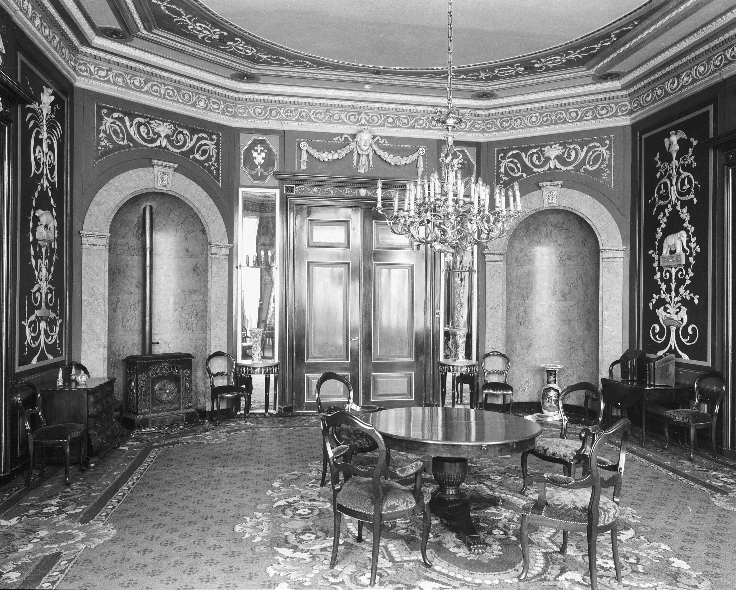 interieur Grote Salon